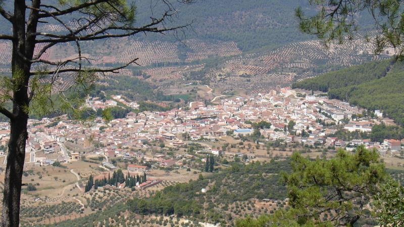 Siles (Jaén) desde su Sierra